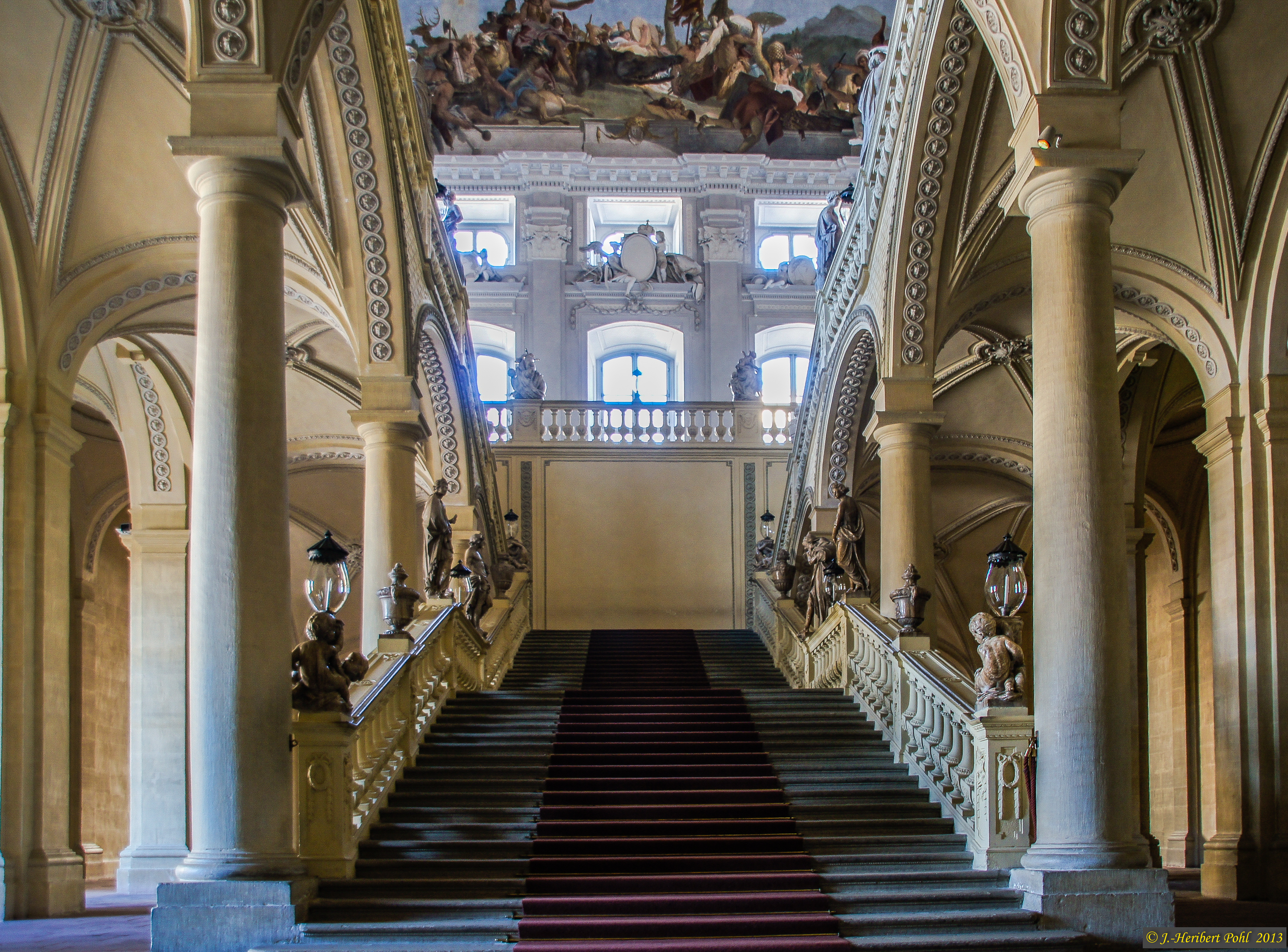 Die im Stil des Barocks gebaute Würzburger Residenz wurde zwischen 1719 und 1744 im Auftrage von Johann Philipp Franz von Schönborn errichtet. Der Baumeister war Balthasar Neumann. Sie war der Sitz der Würzburger Fürstbischöfe. Im europäischen Kontext gilt es als einer der bedeutendsten Residenzbauten des Spätbarocks und steht mit einer Reihe mit Schlössern wie Schönbrunn (Wien) und Versailles. Seit 1881 gehört das Schloss zum Weldkulturerbe.